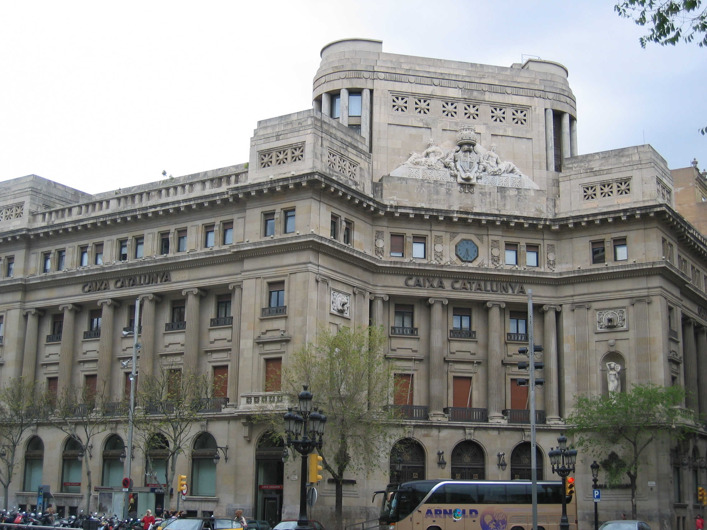 Edifici Caixa Catalunya - Barcelona131549034